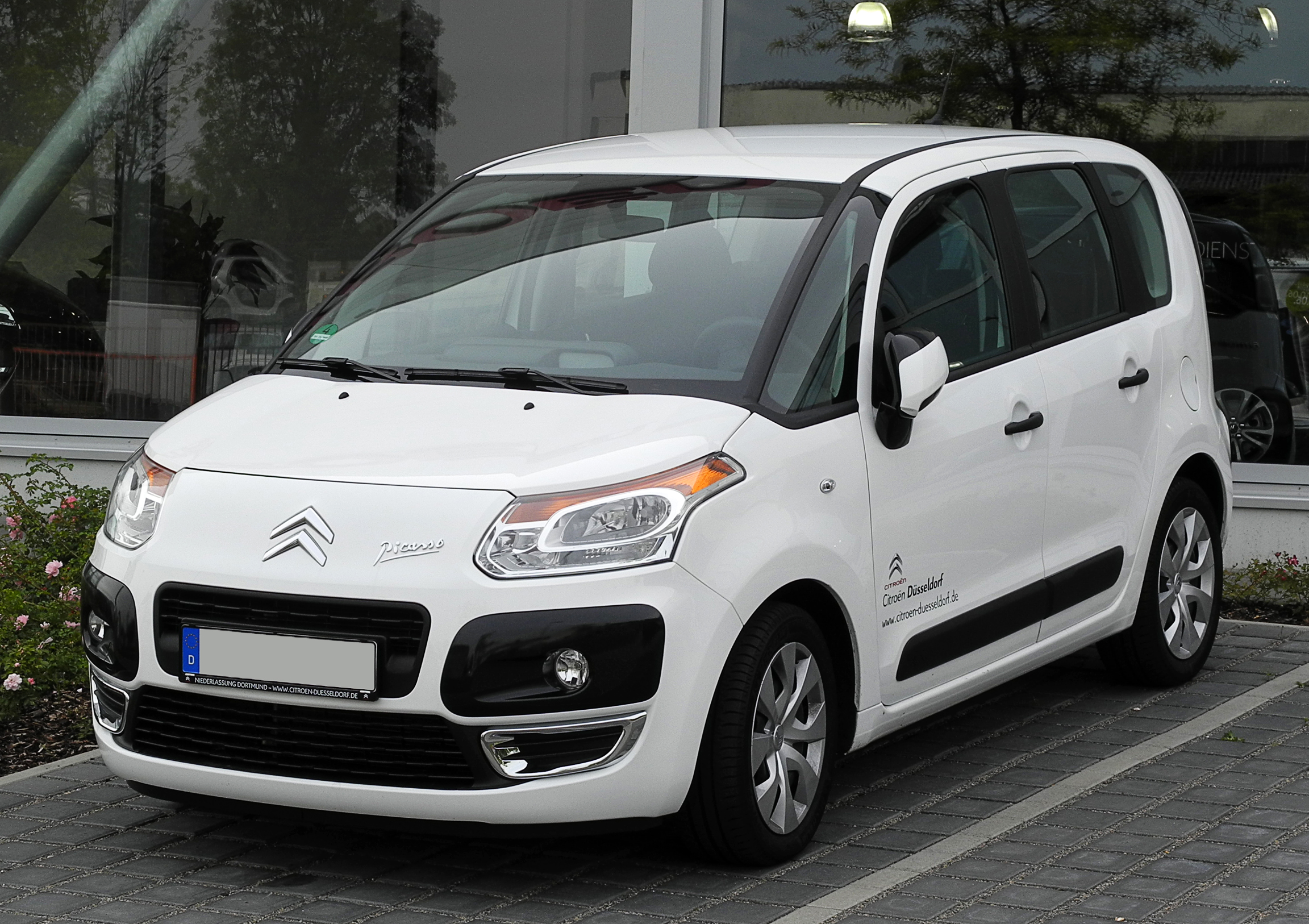 Citroën C3 Picasso VTi 95 Tendance